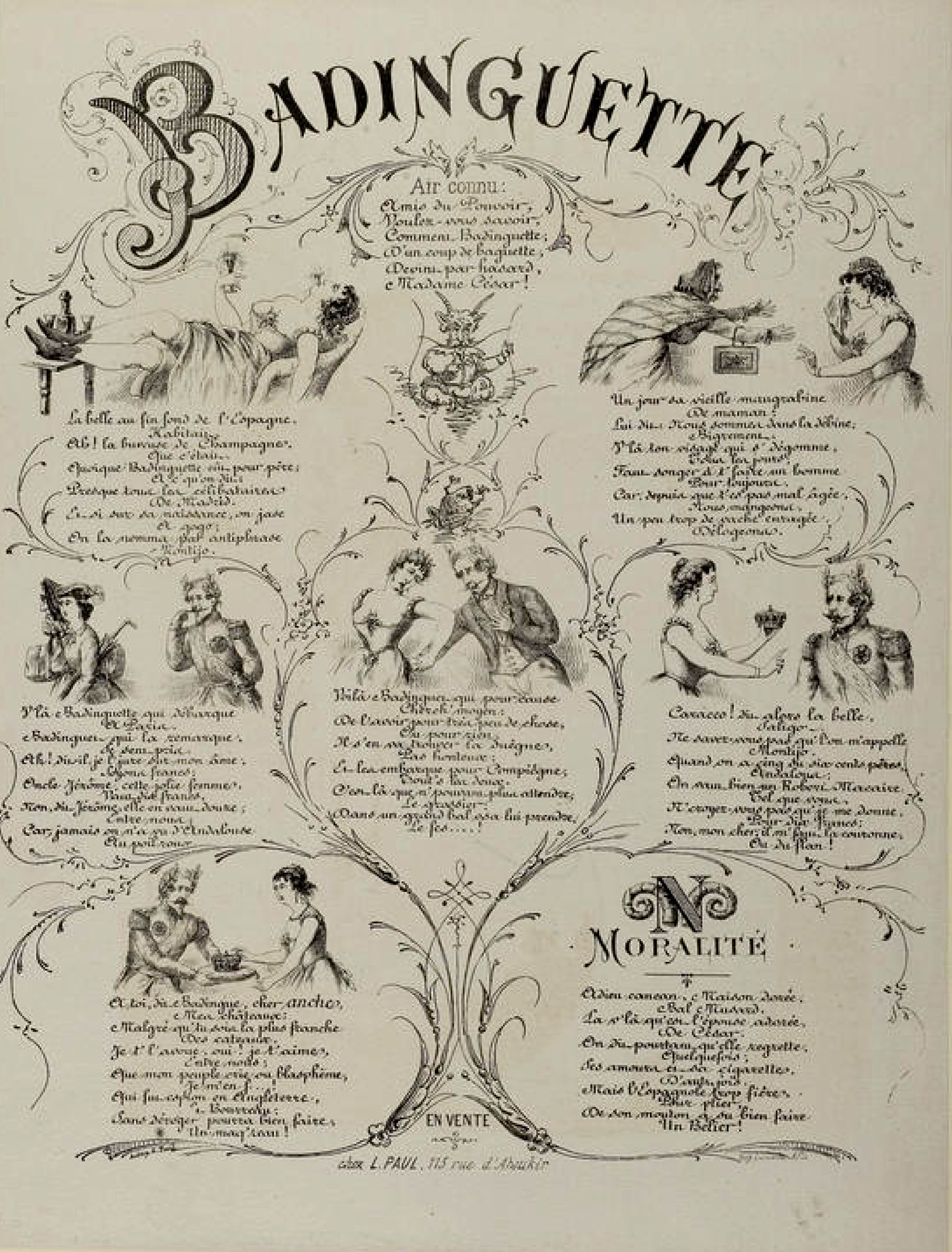 Badinguette. Collection de caricatures et de charges pour servir à l'histoire de la guerre et de la révolution de 1870-1871 (Vol. 1, p. 71)